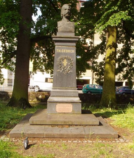 Theodor Georgii Denkmal Fotografiert: selbst